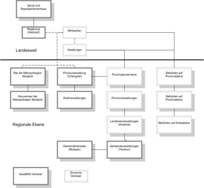 Organisation des thailändischen Regierungssystems